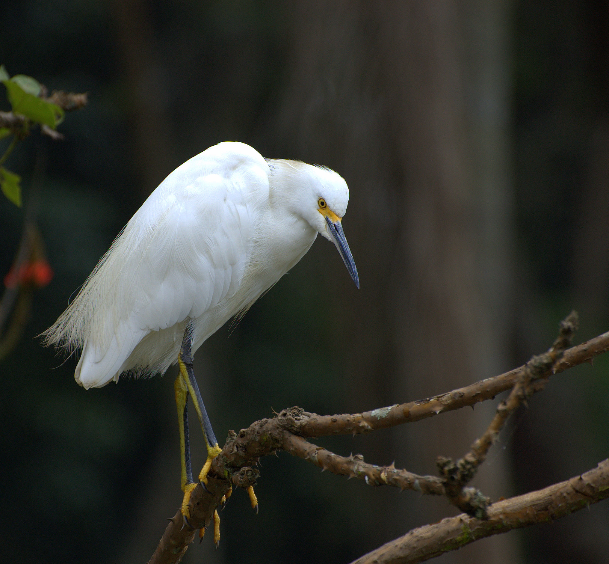 Horto Florestal de São Paulo